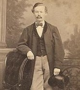 August Otto Mankell (1838-1885)